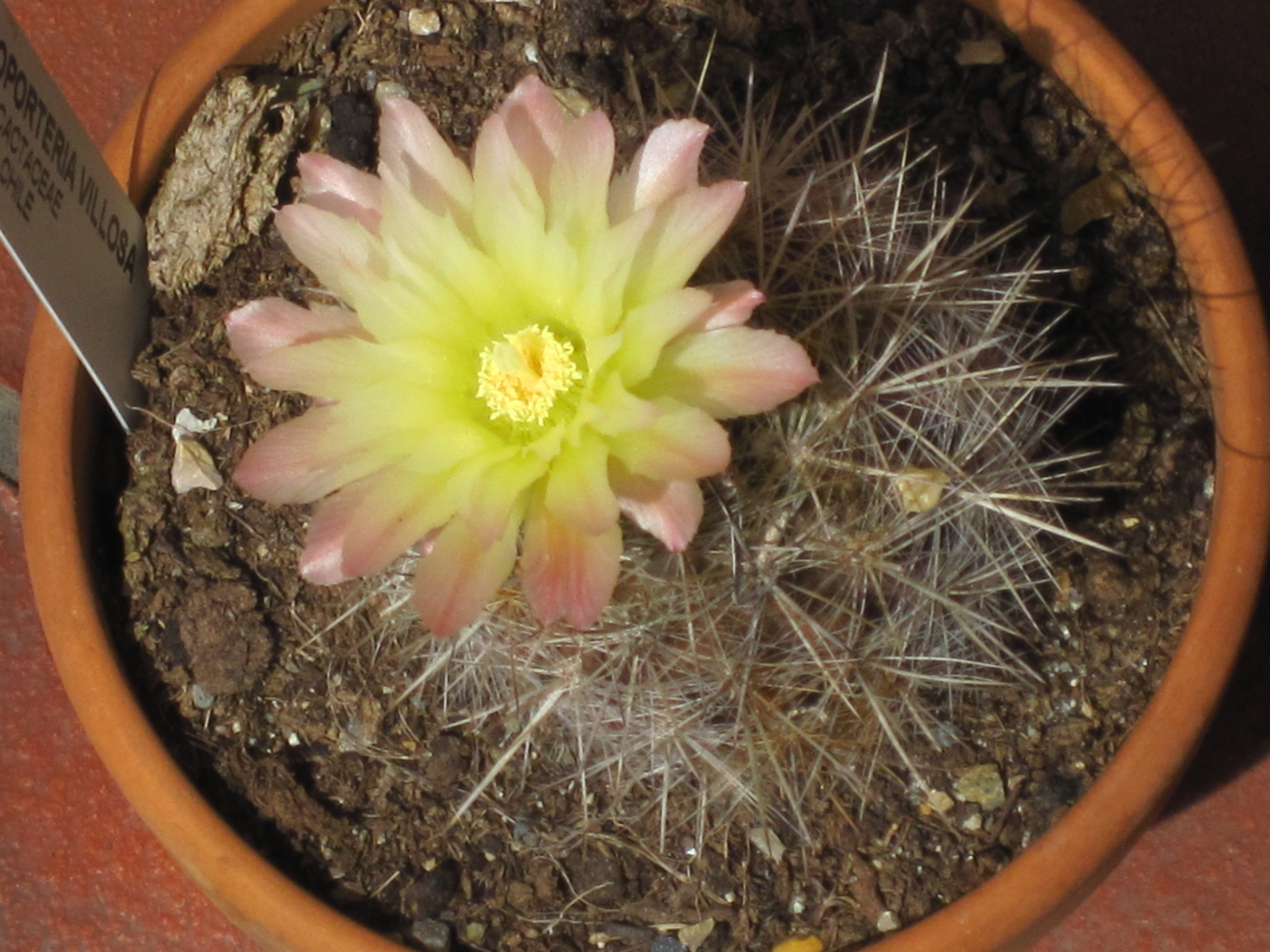 Eriosyce villosa in fiore